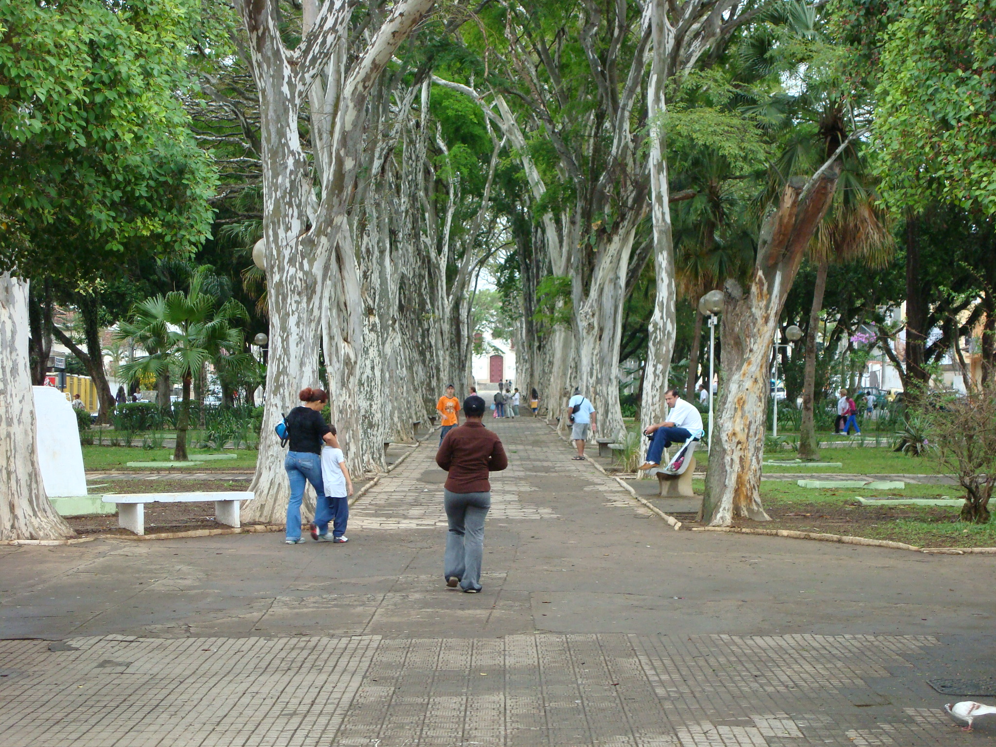 corredor de árvores da praça de Campo Belo